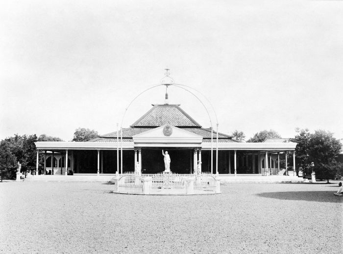 Foto. Vooraanzicht van de kraton in Soerakarta.